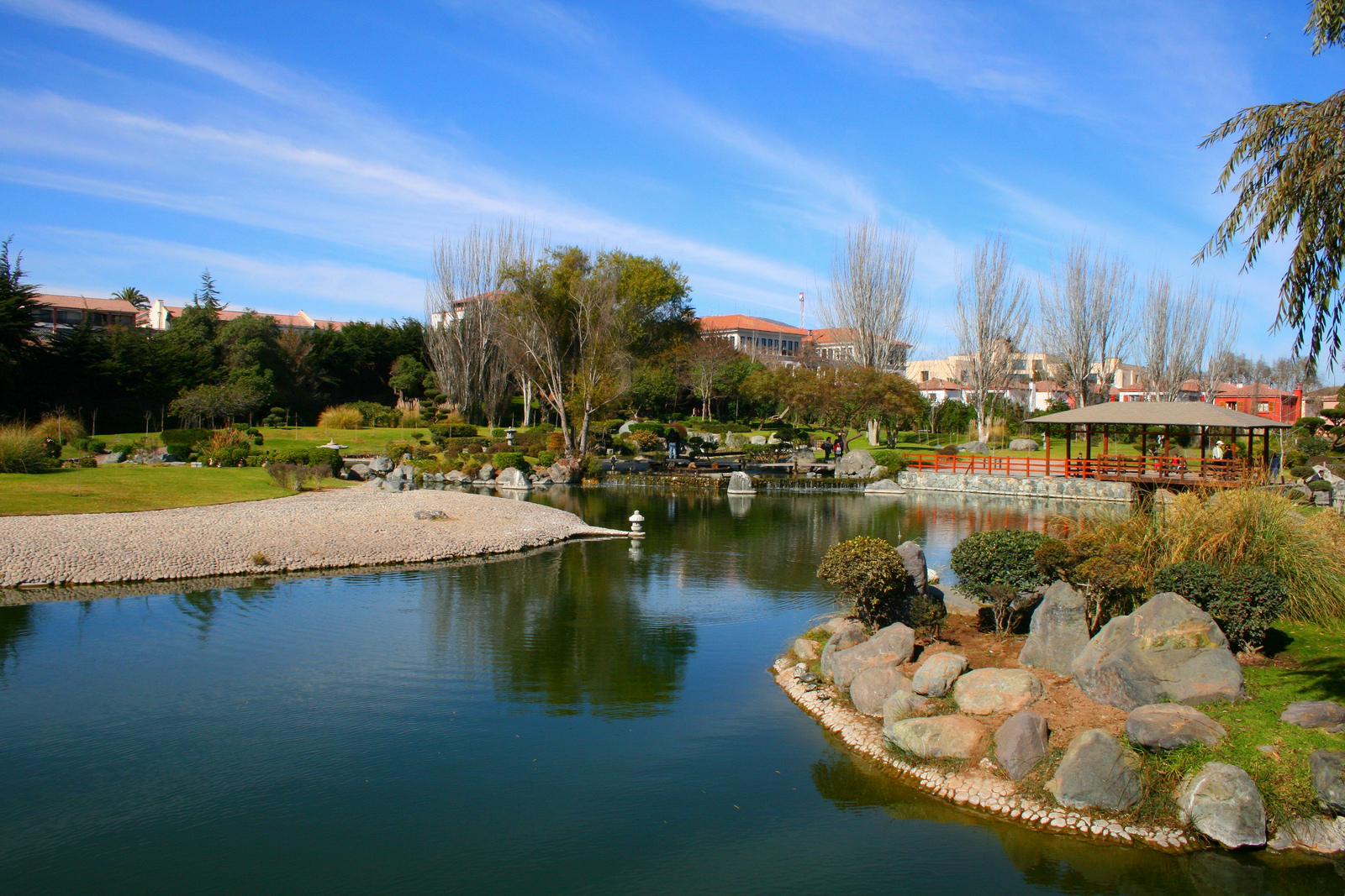 Parque Japones de La Serena